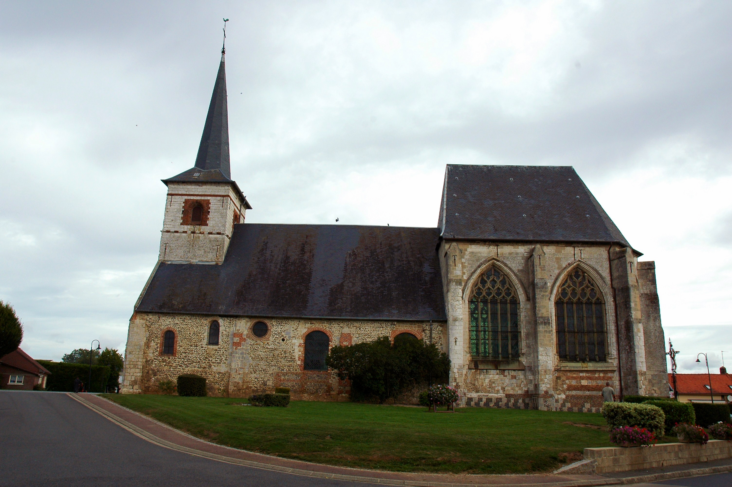 Feuquières-en-Vimeu (Somme, France). L'église. Les murs de la nef sont en grande partie appareillés en arête-de-poisson.